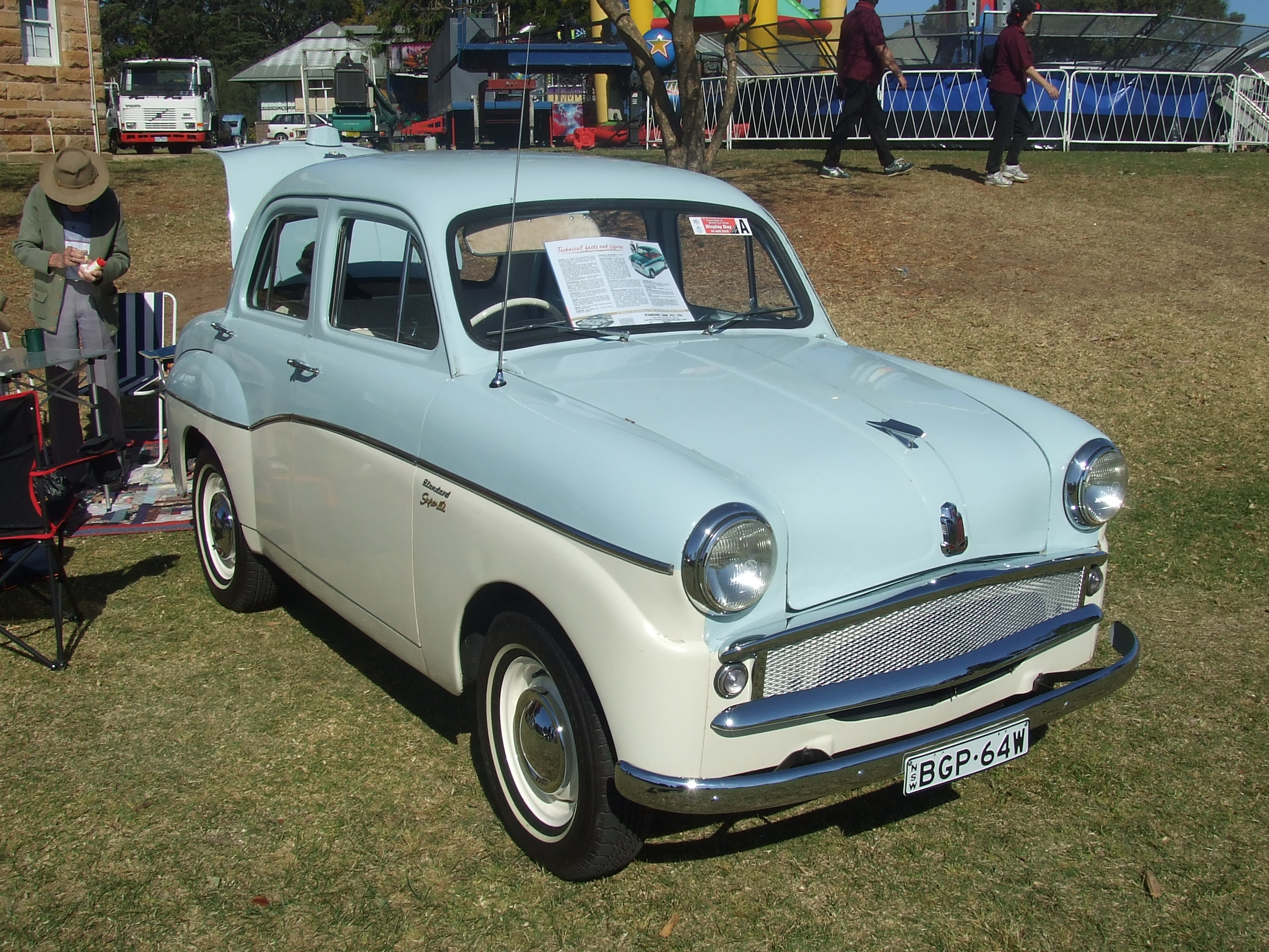 Standard Super 10